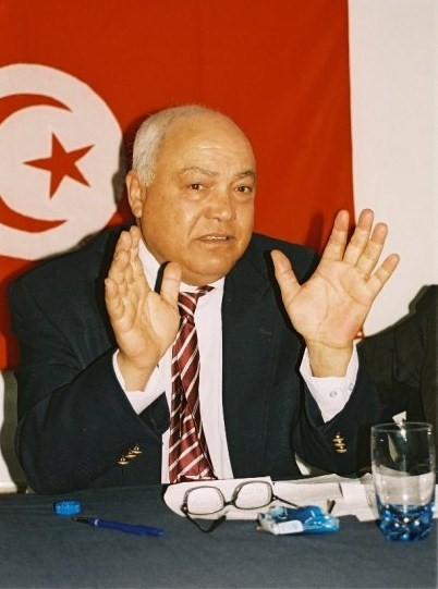 Ahmed Brahim lors d'un meeting avec les militants du Mouvement Ettajdid à Mahdia